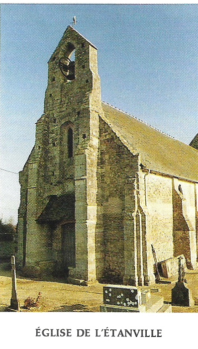 EGLISE CLASSEE AU PATRIMOINE HISTORIQUE DE L ETANVILLE